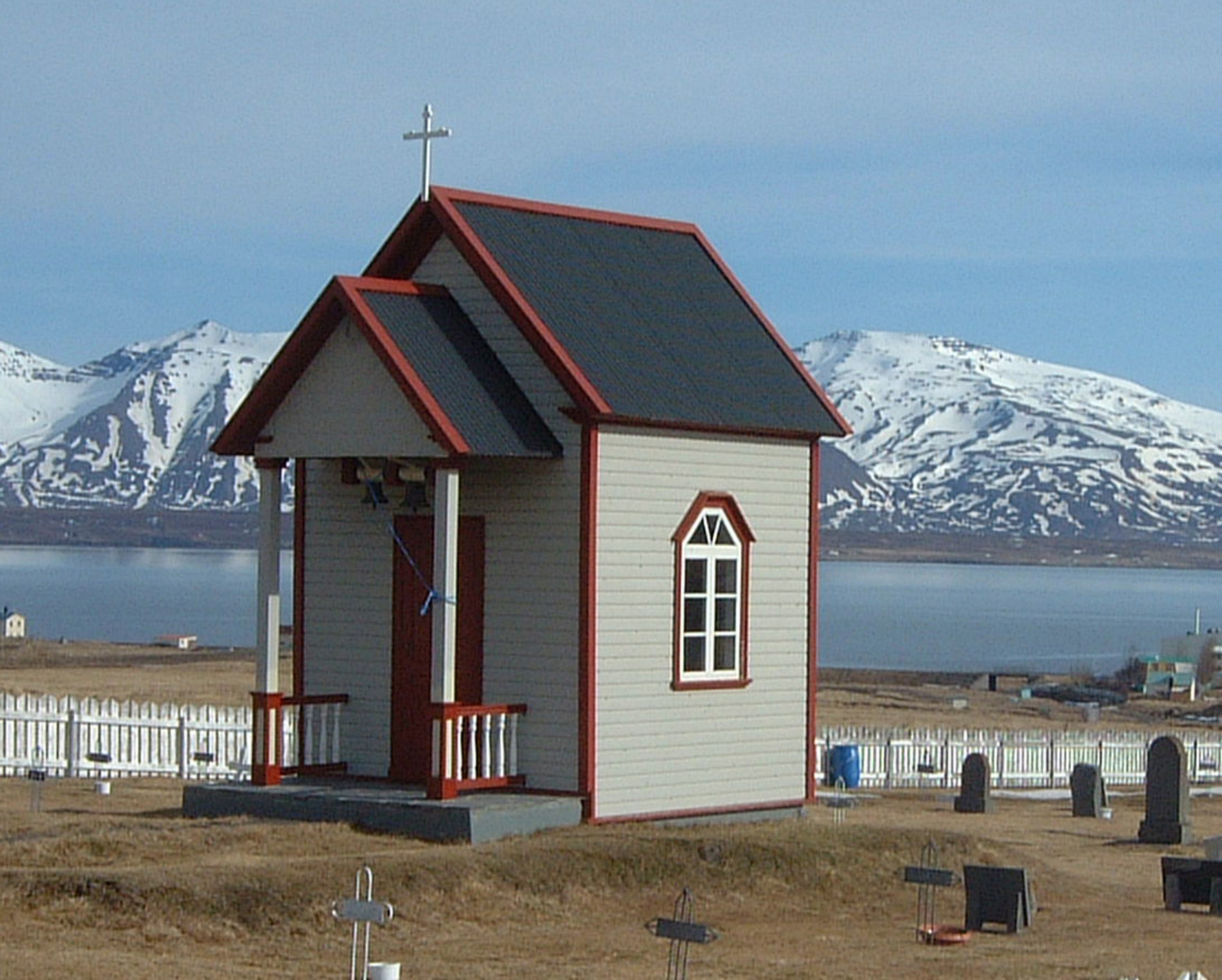 Upsakapella á Dalvík (N-Iceland)